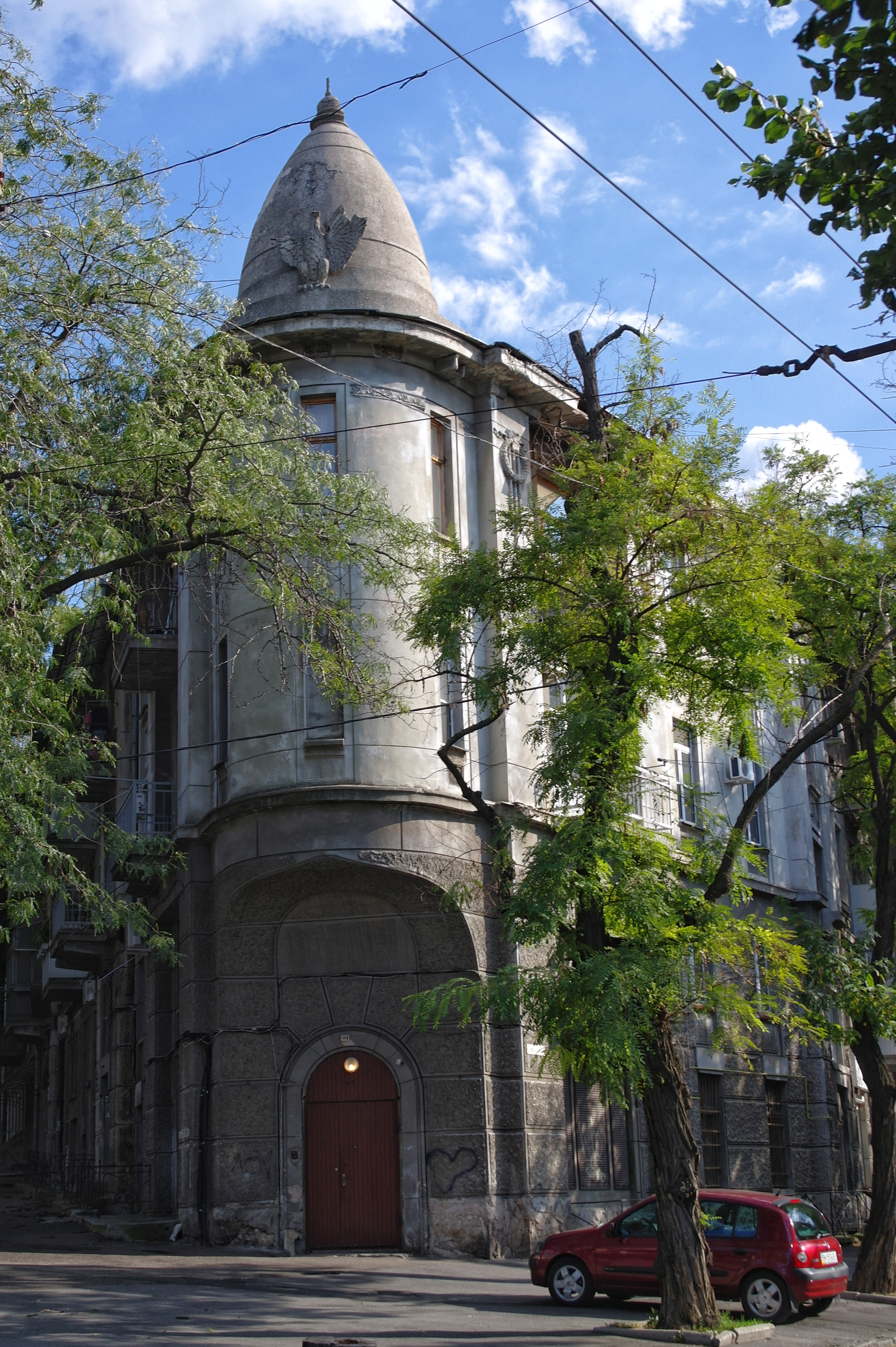 Одеса, Коблевська, 2